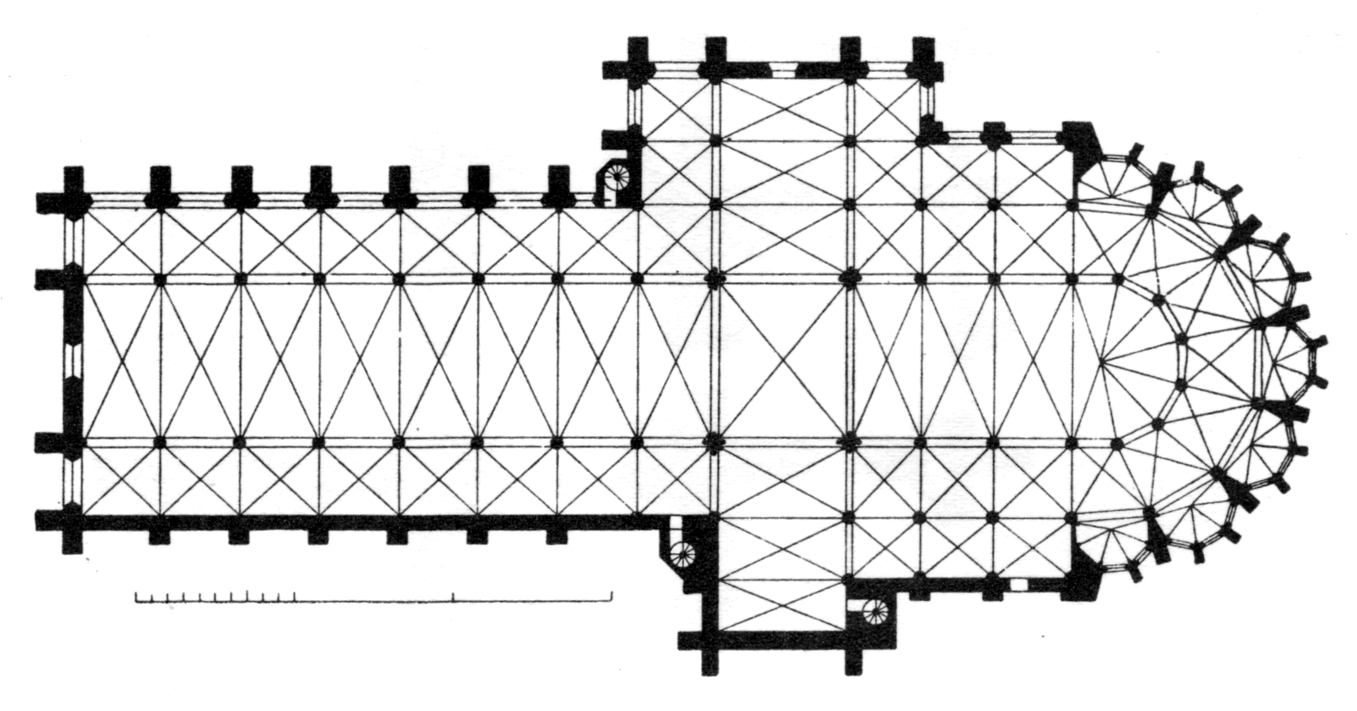 Altenberg